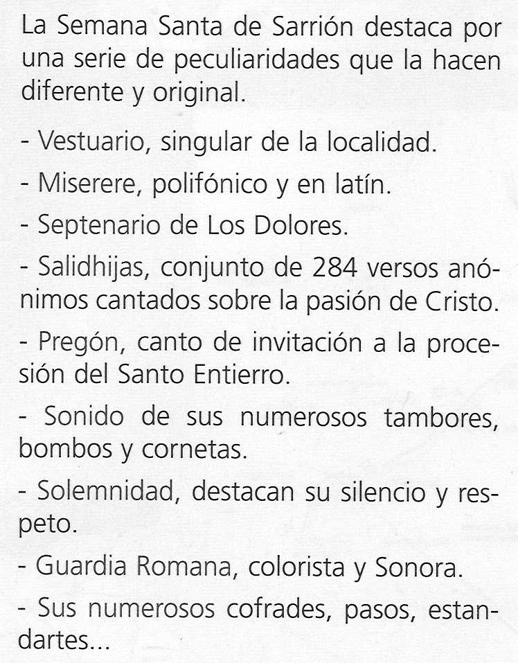 Particularidades de la Semana santa Sarrion